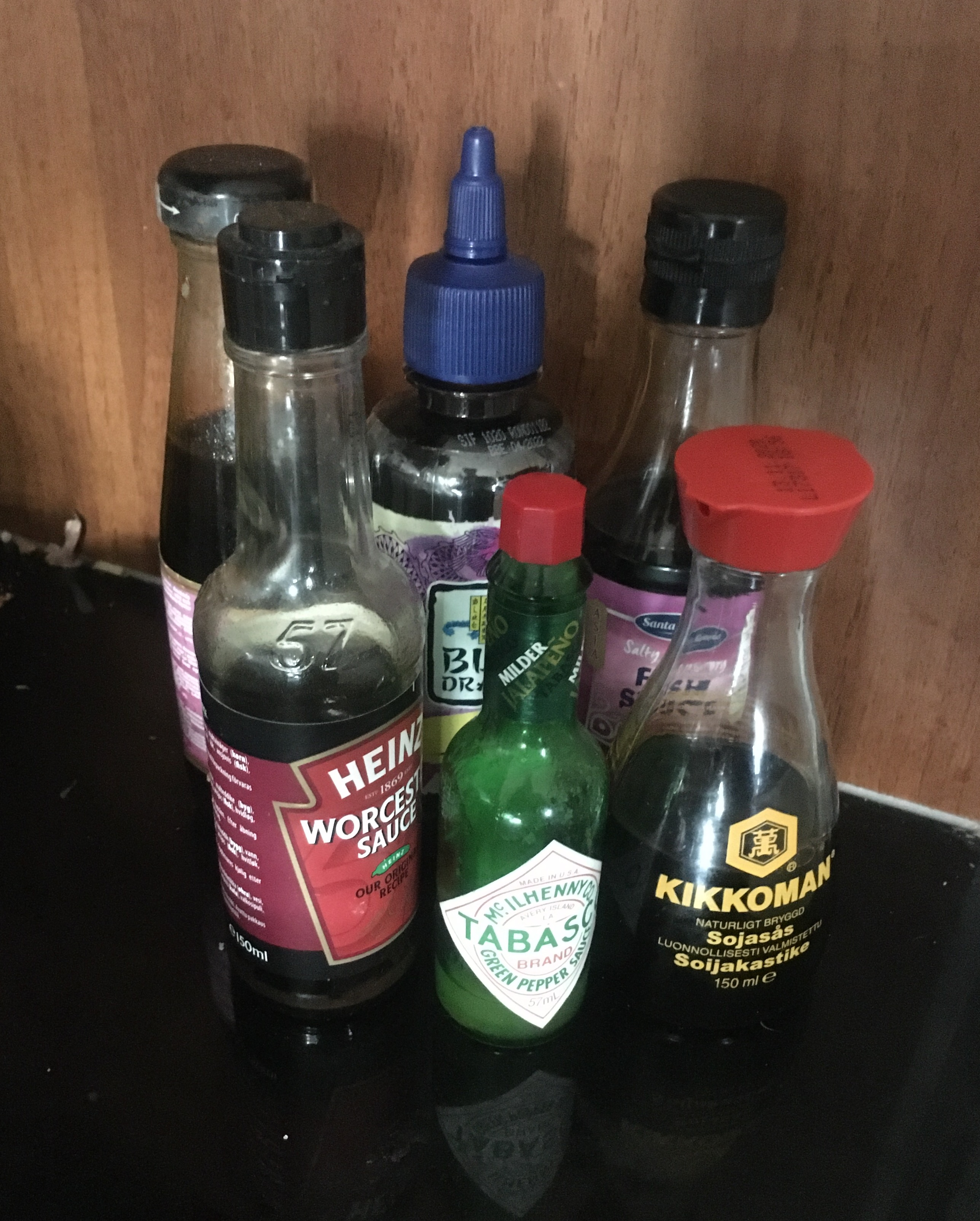 Worcester-kastike, Tabasco, Soijakastike ja eri kalakastikkeita